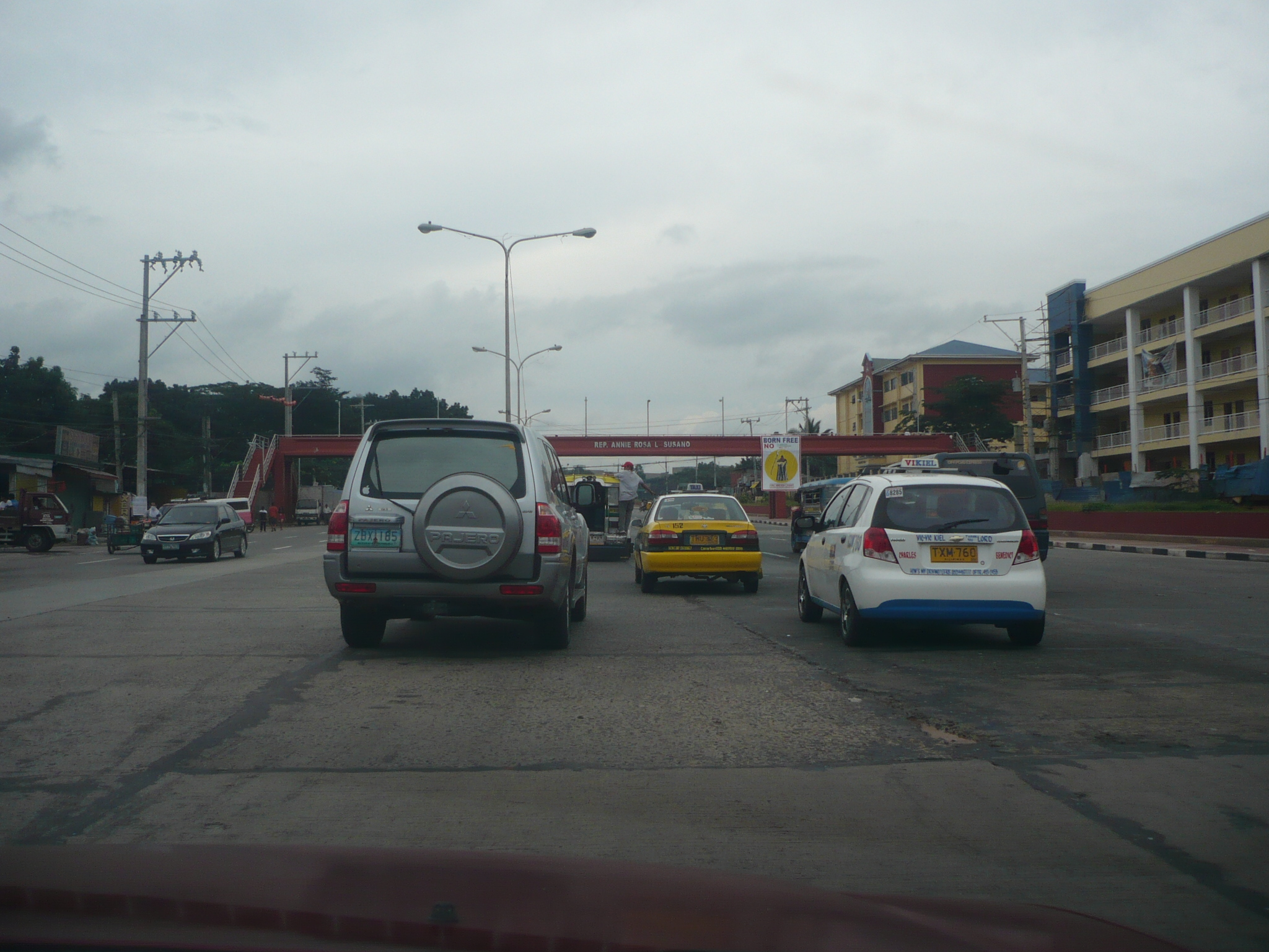 Batasan Road